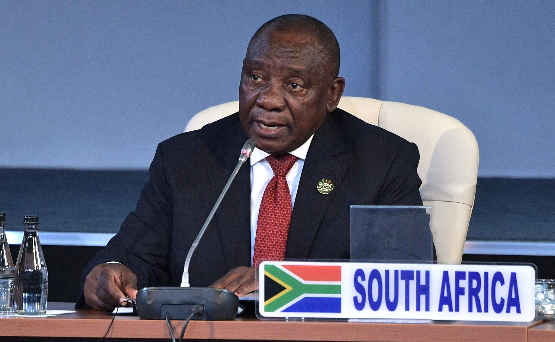 На встрече лидеров БРИКС с главами делегаций приглашённых государств. Президент Южно-Африканской Республики Сирил Рамафоза.